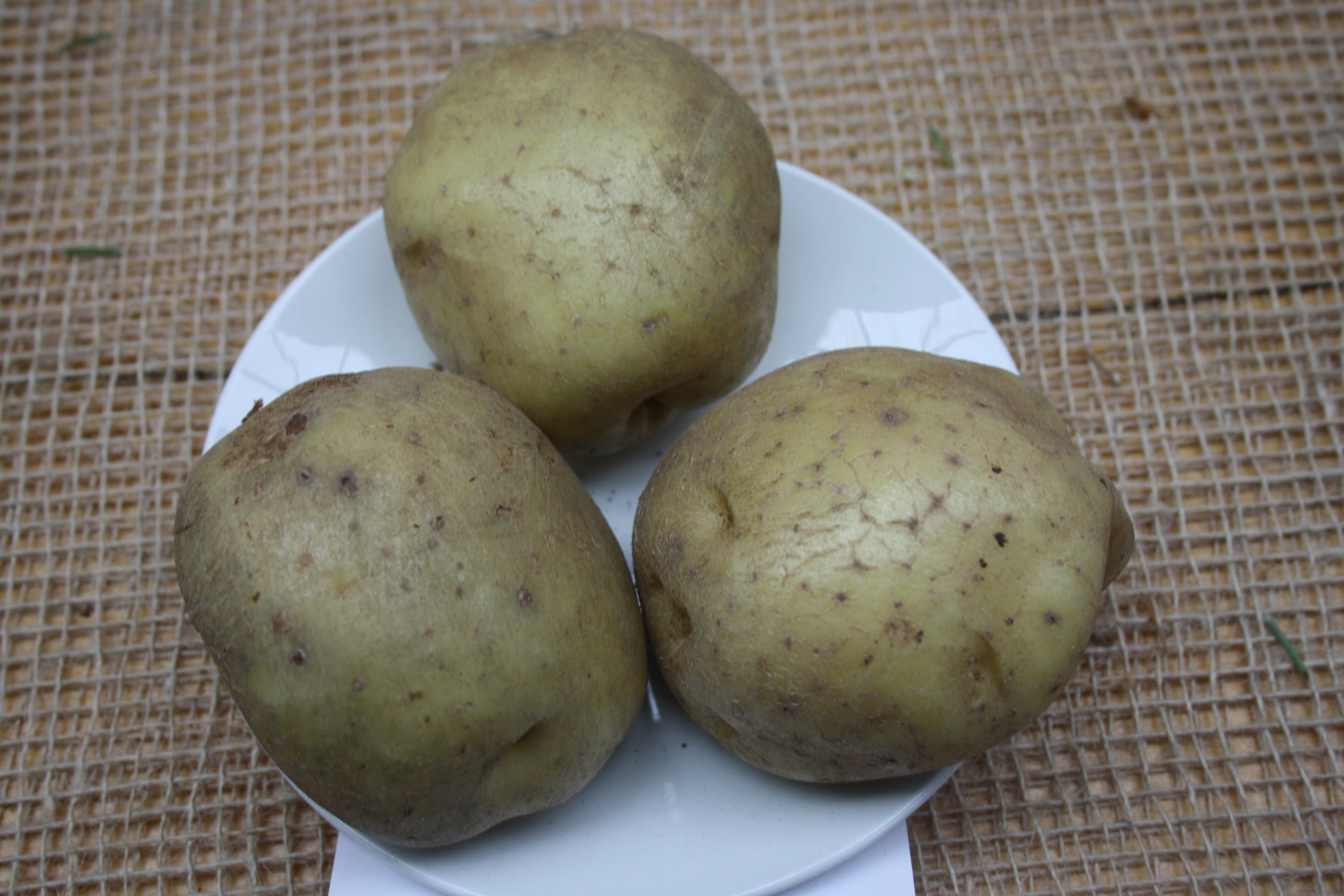 Bild aufgenommen auf dem Apfeltag auf Gut Wulksfelde - Sortenname im Dateinamen laut Beschriftung vor Ort